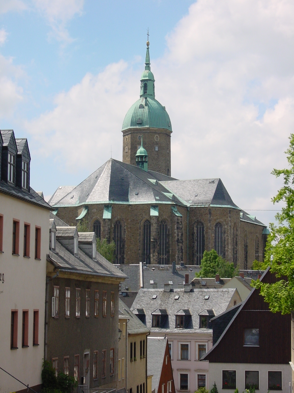 Blick auf die Sankt Annenkirche in Annaberg-Buchholz aus Richtung Osten (Foto:geme/2001-06-07)